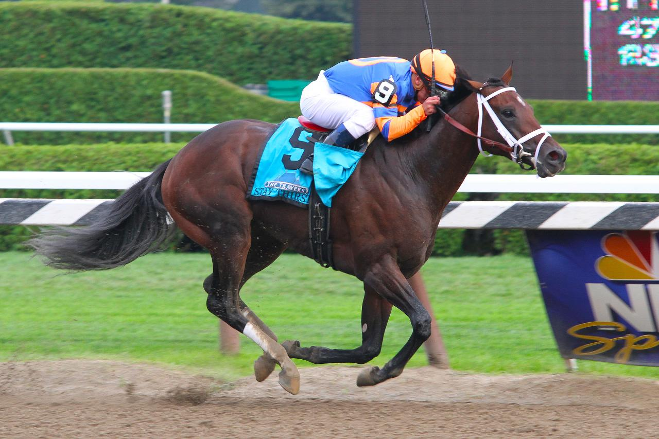 Saratoga Racetrack, NY